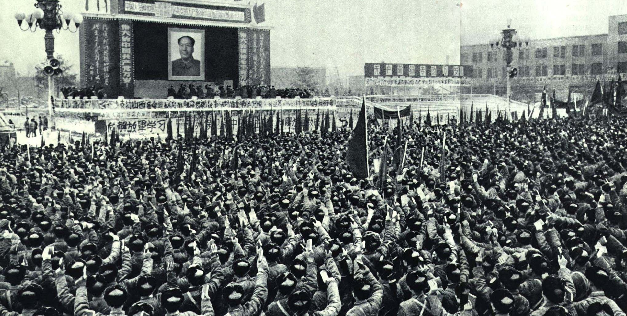 1967-07 1967年 山西省军区